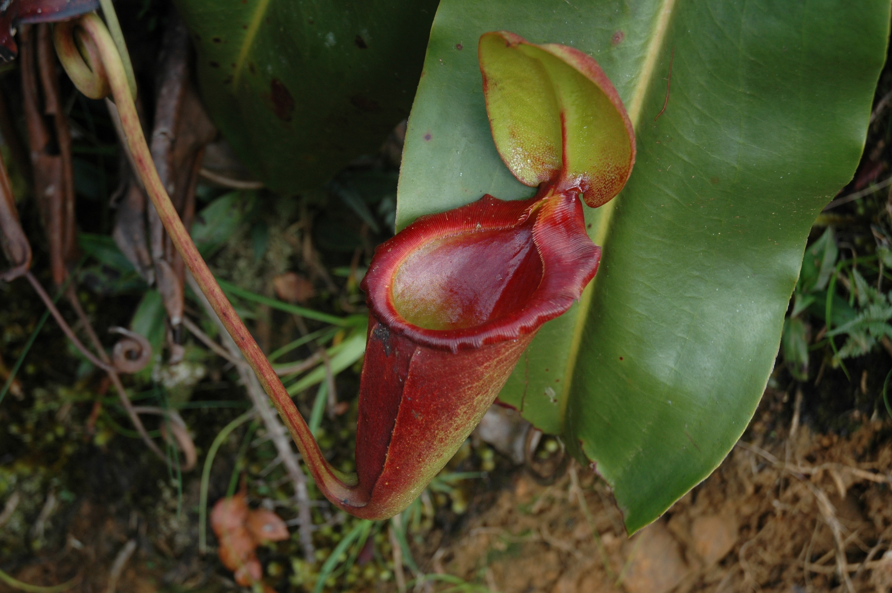 Nepenthes rajah upper pitcher Kinabalu Mesilau by Jeremiah Harris